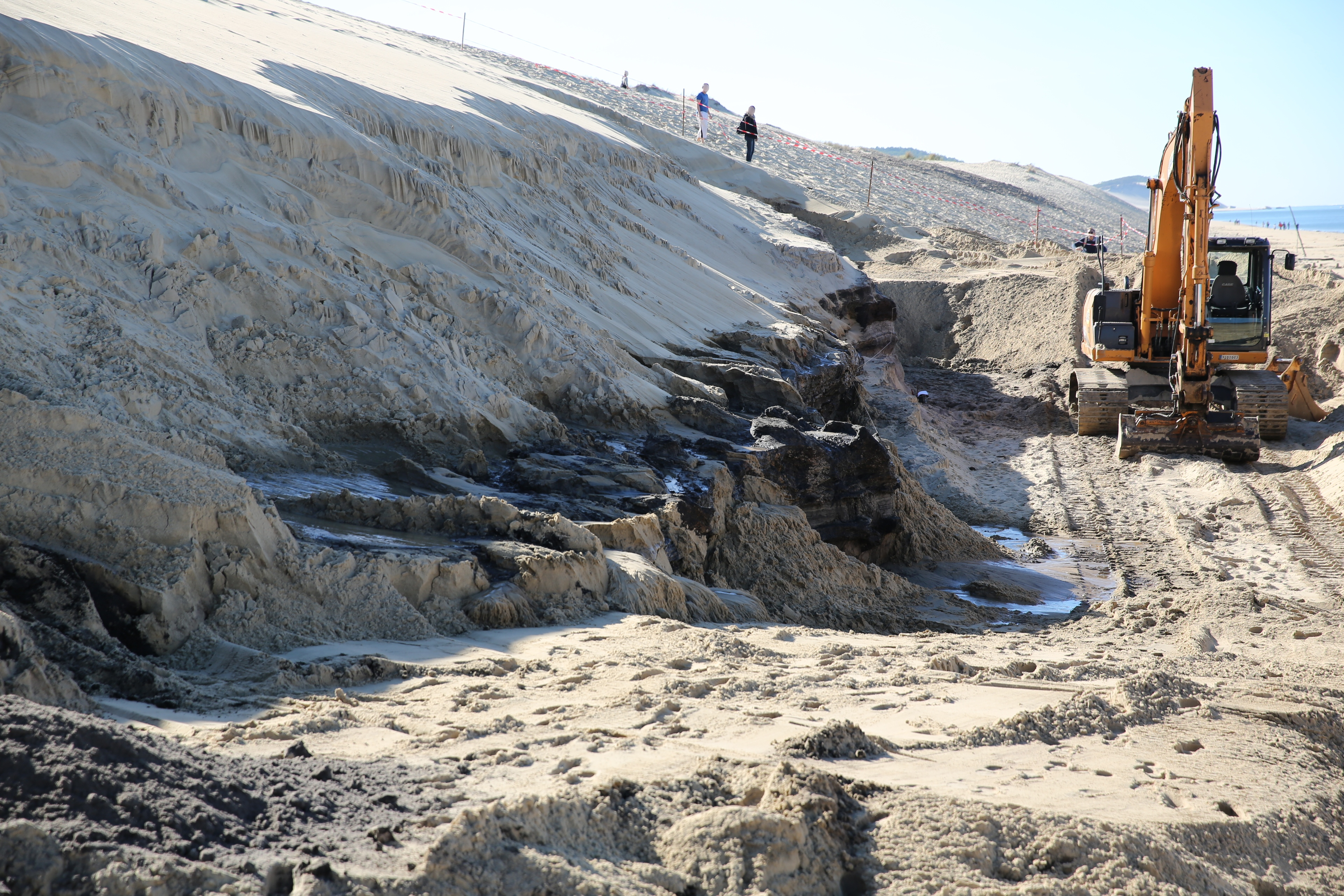 La Teste-de-Buch (Gironde, France) - Dégagement à la pelle mécanique d'une épaisse strate de tourbes compactées de la Dune du Pyla.